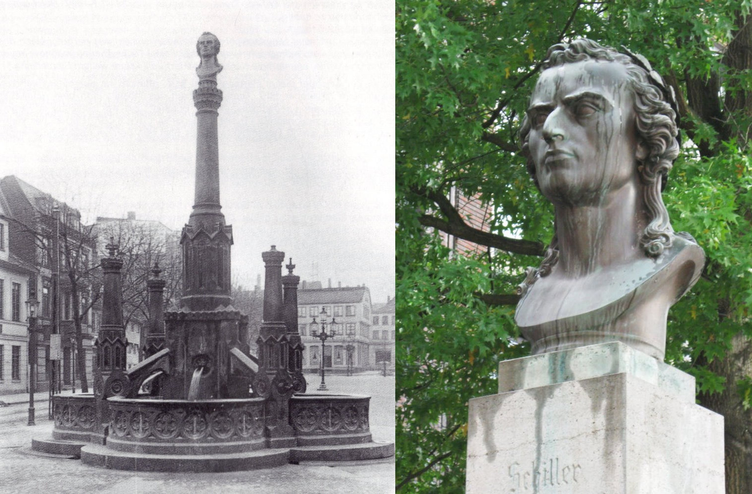 SchillerBrunnen in Hamburg-Harburg (Einweihung 1861), Am Sand, von Ernst von Bandel